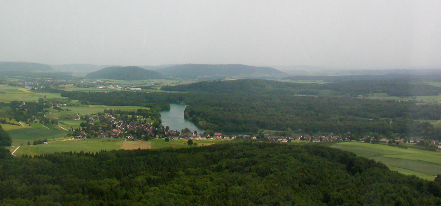 Switzerland, Canton of Schaffhausen, Büsingen from overhead Schaffhausen